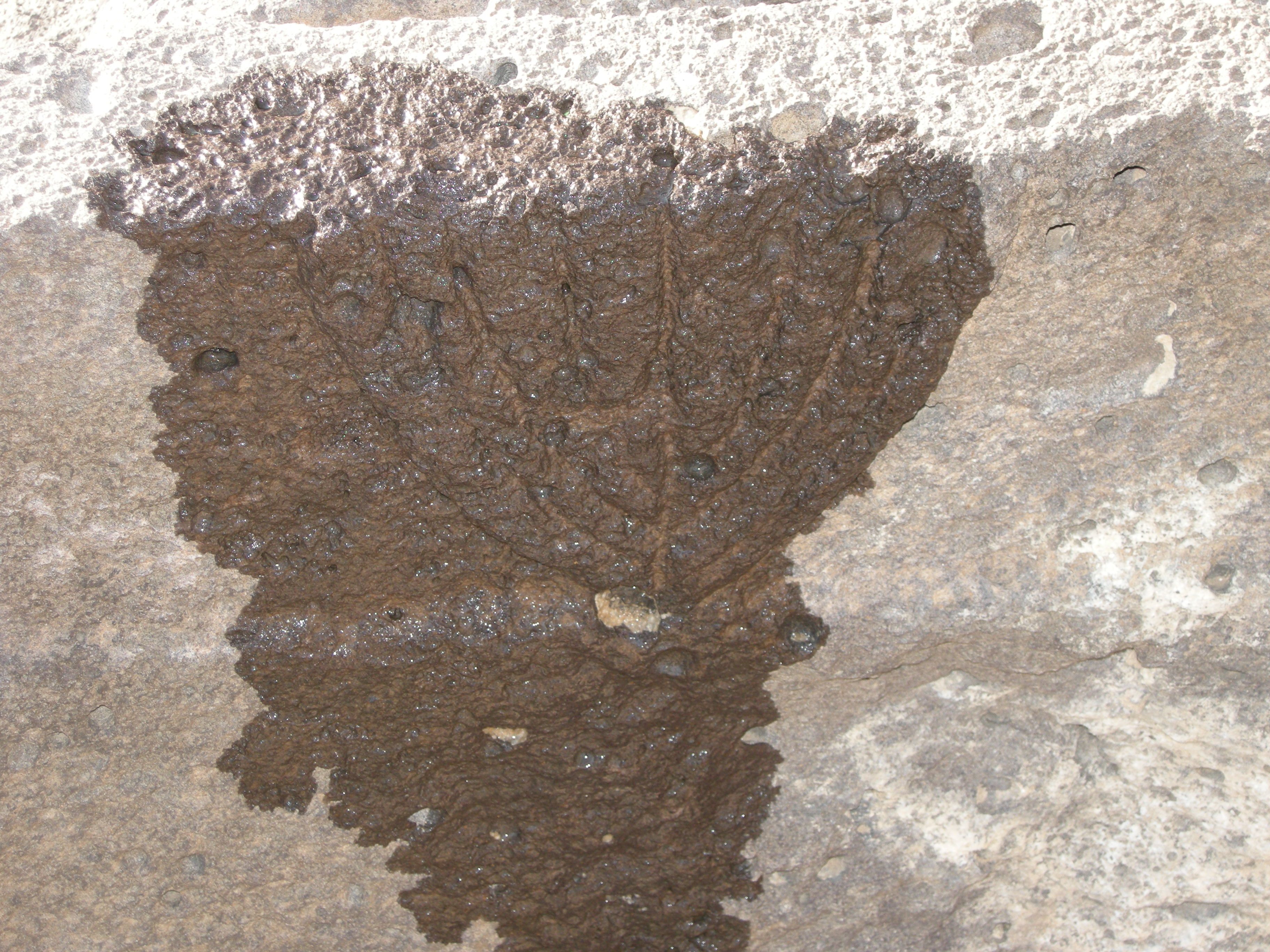 Um el Kantar